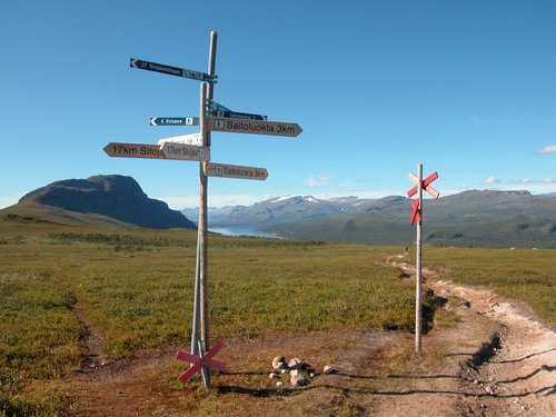 Wegabschnitt des Kungsleden Wegstück Saltoluokta - Sitojaure; Blickrichtung N (Stora Sjöfallet und Lulep Kirkau)